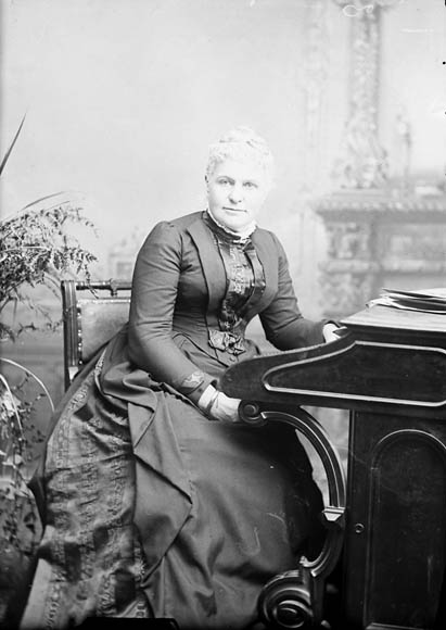 Lady Frances Tupper (Née Frances, Amélia Morse)